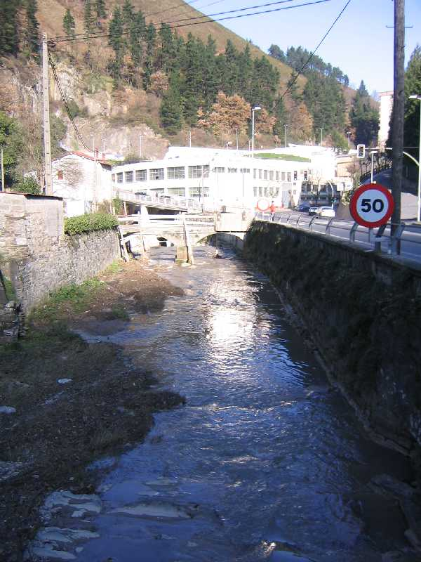 Río Ego entrando en Eibar (Guipuzcoa). ==Source== Fotografía propia. --txo Diciembre 2005 (UTC)